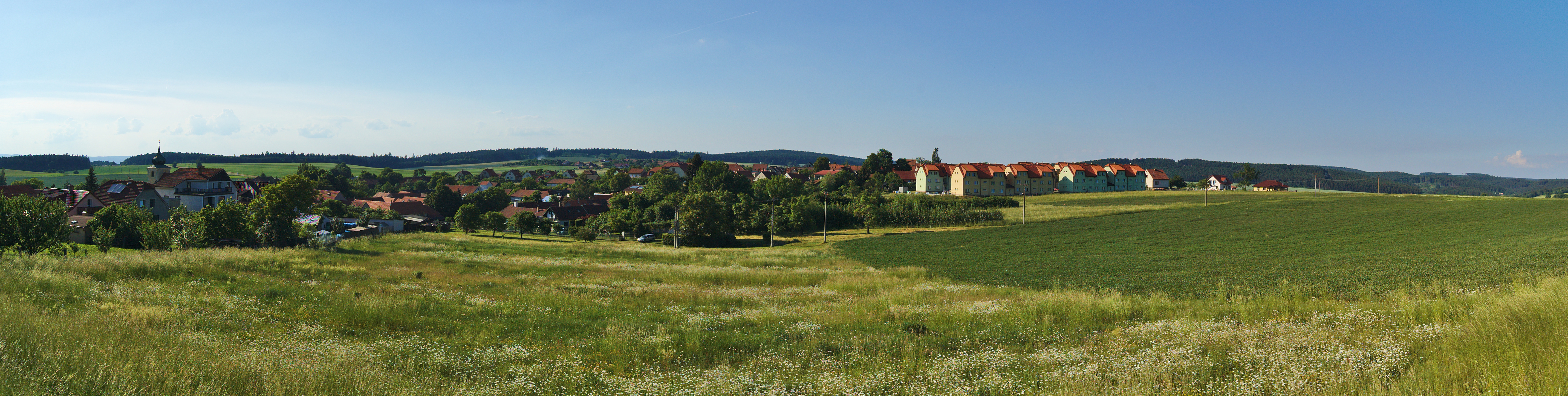 Panoramatický pohled na obec od jihovýchodu, Petrovice, okres Blansko